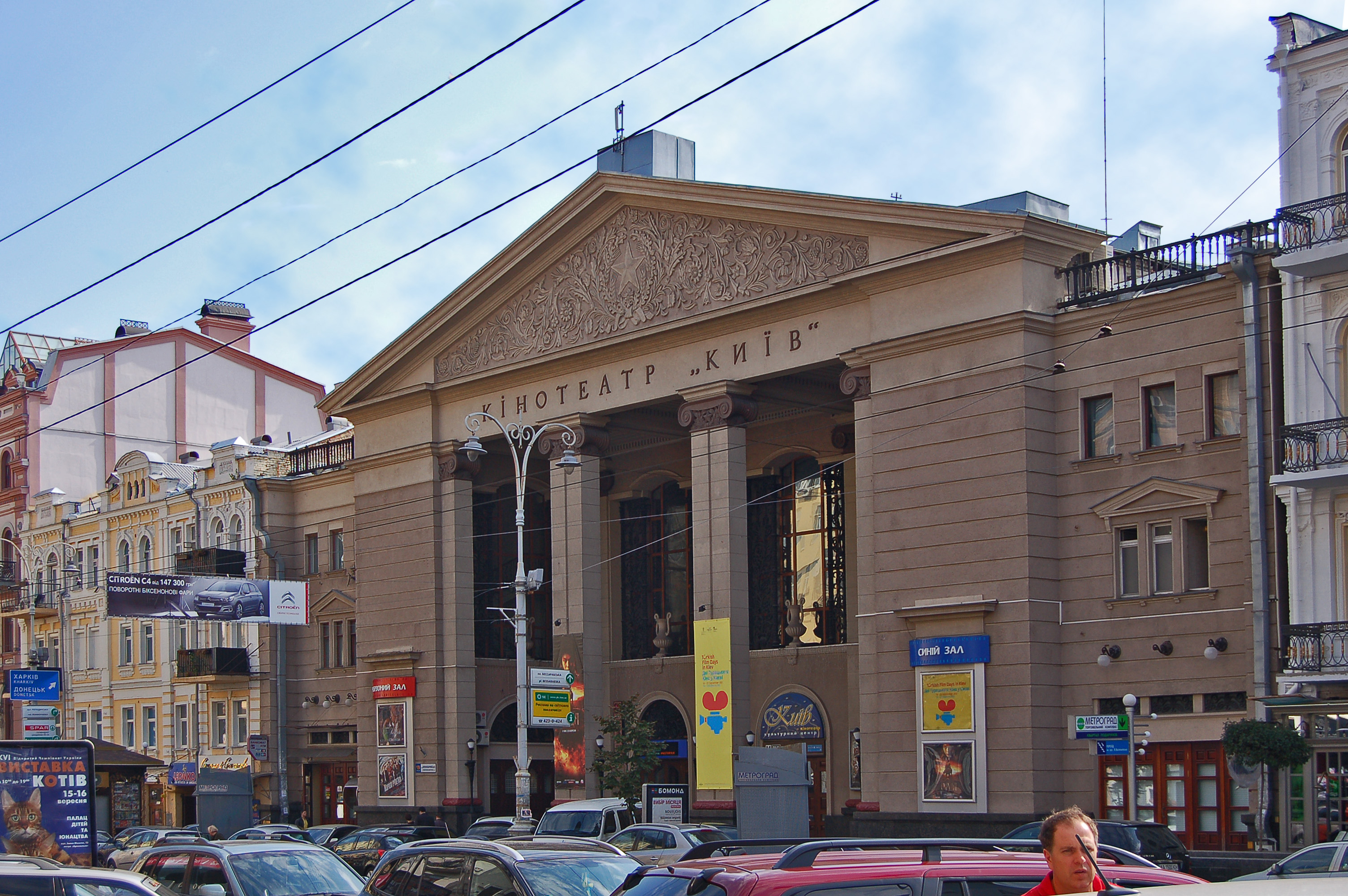 Дом № 19 по Красноармейской улице в Киеве